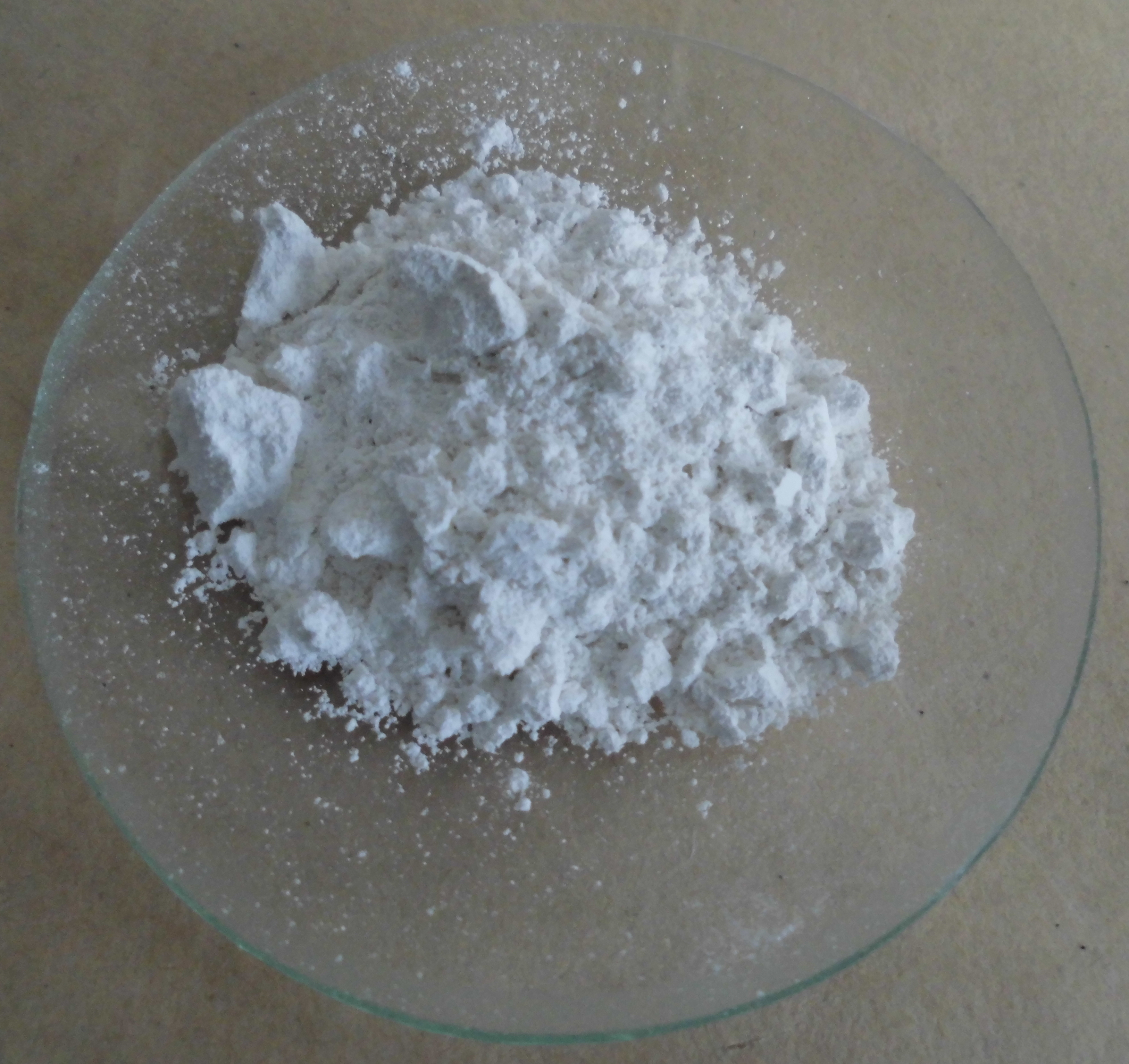 氧化钙粉末，AR，纯度≥98.0%